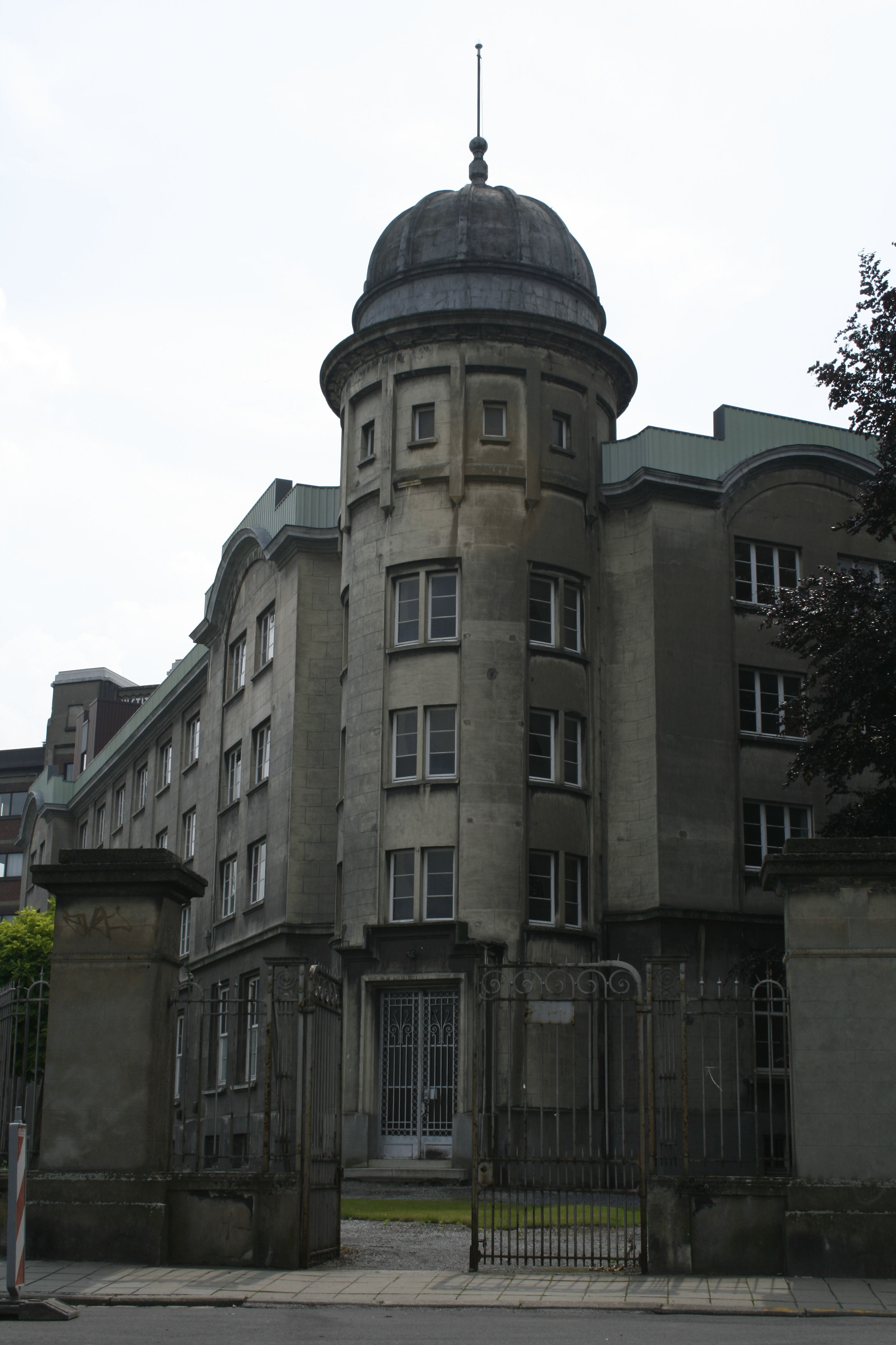 HELMo Gramme